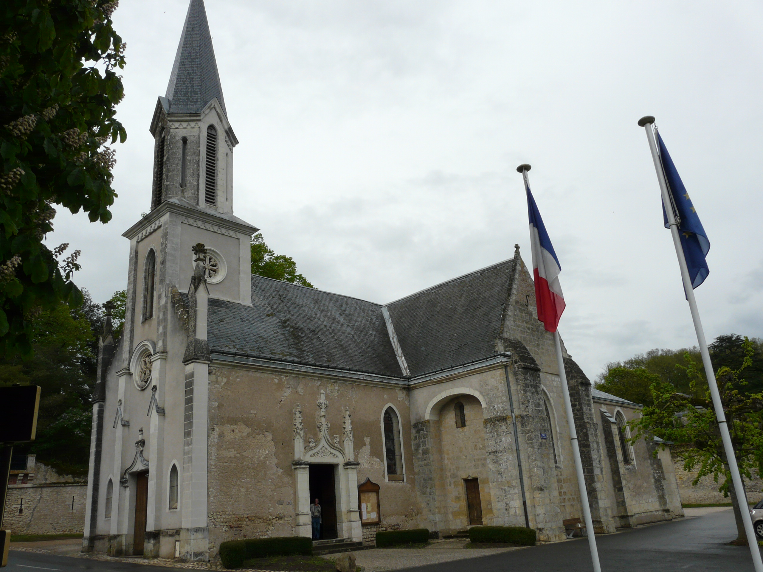 Église Saint-Prixde, Noizay, France